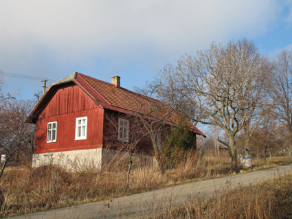 chatka SKPB Warszawa w Teodorówce, Polska